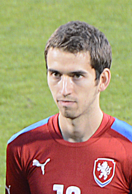 Mezinárodní fotbalový zápas Česko - Rakousko v Olomouce